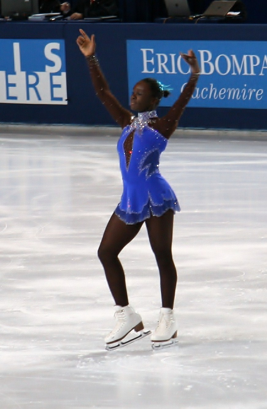 Maé-Bérénice Méité at the 2010 Trophée Eric Bompard, SP